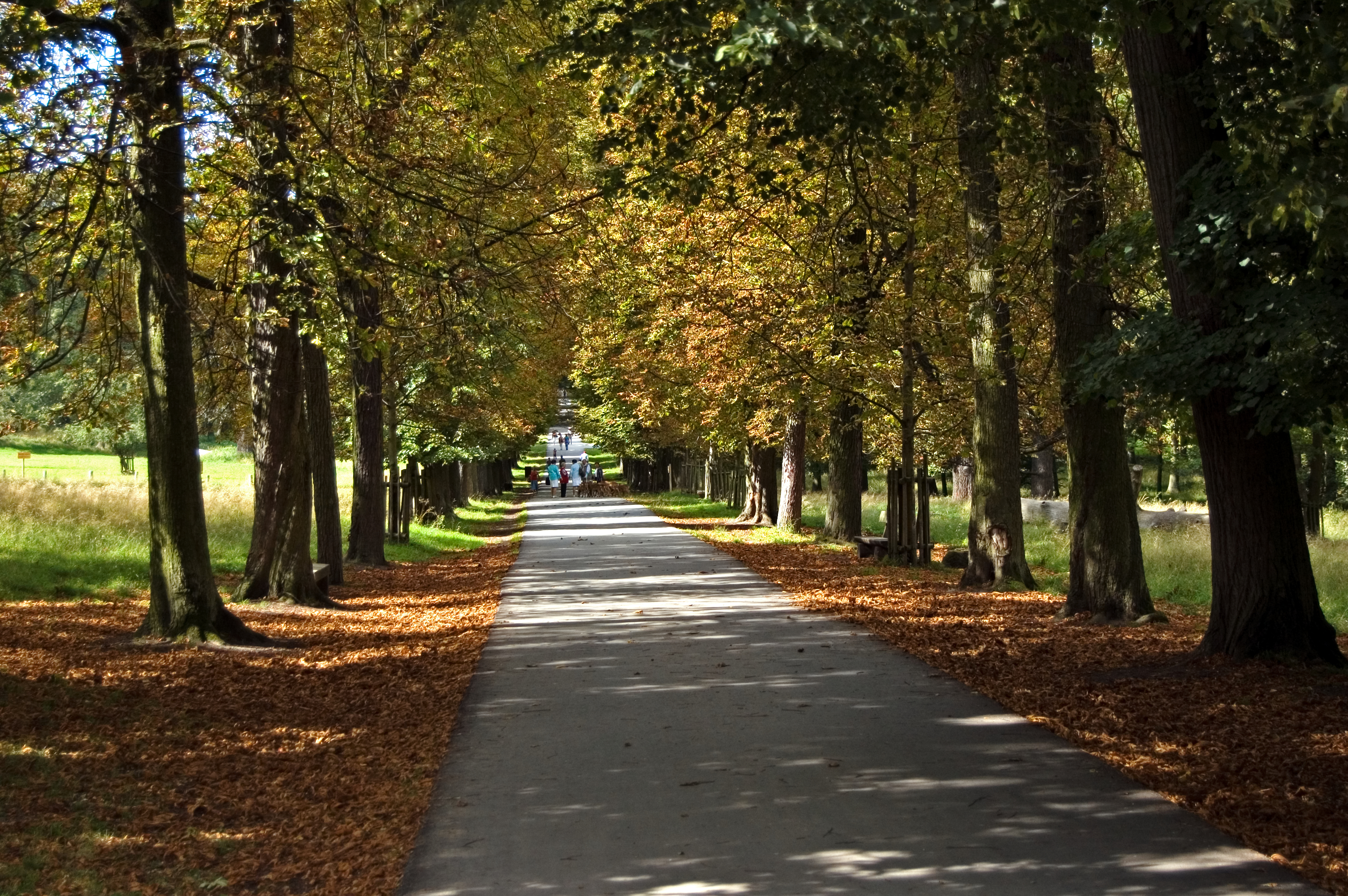 Allee im Park vom Schloss Favorite in Ludwigsburg bei Baden-Württemberg.